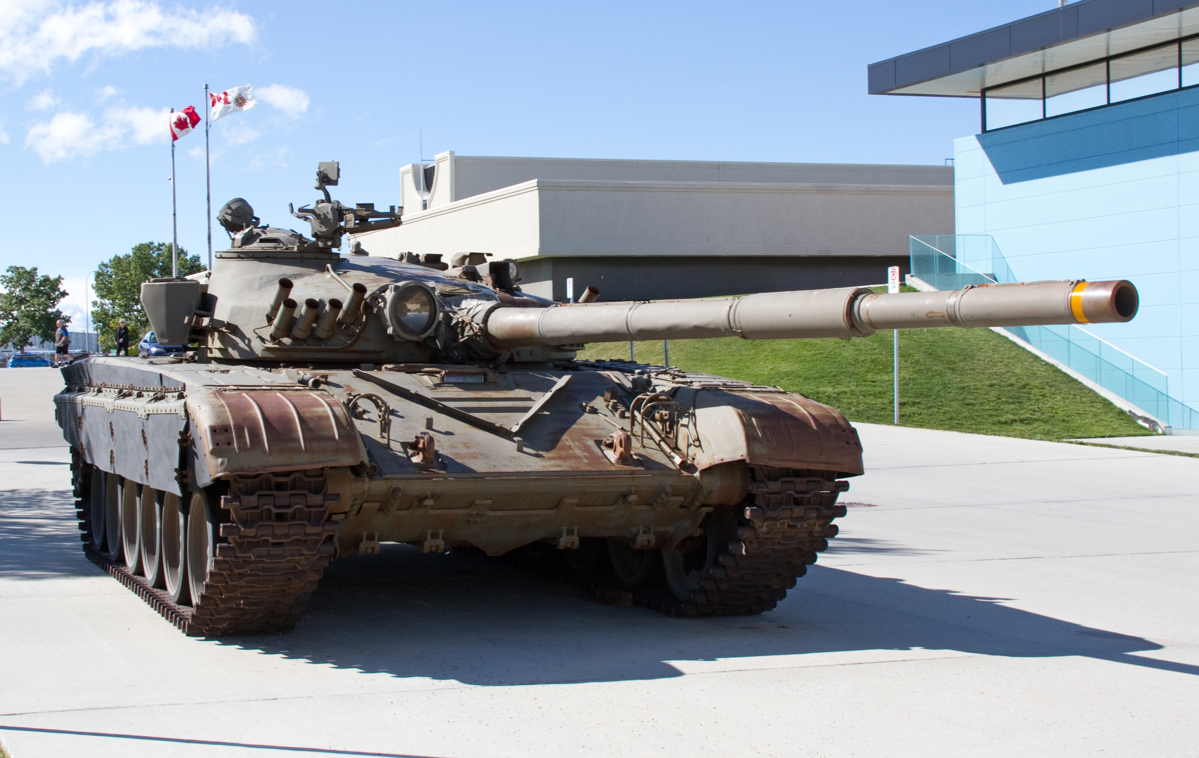 T-72 tank displayed in Calgary.